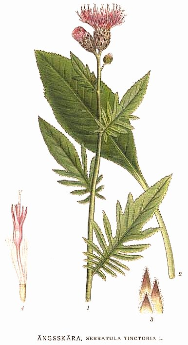 Original Description Ängsskära, Serratula tinctoria L.